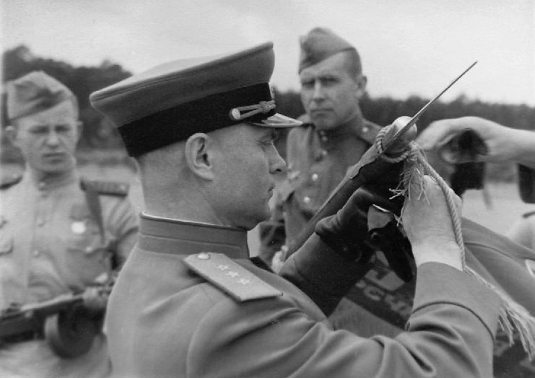 Военный парад в честь победы в Великой Отечественной войне в Штраусберге (Германия). Командующий артиллерией 1-го Белорусского фронта генерал-полковник В. И. Казаков награждает отличившиеся в боях за Берлин части и соединения 4-го артиллерийского корпуса прорыва РГК